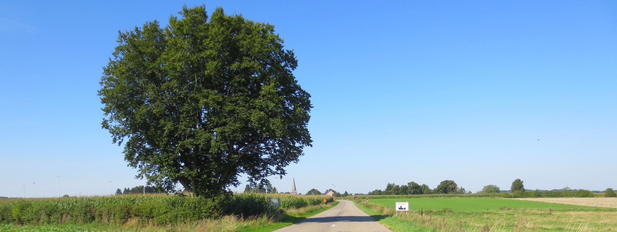 Bourlers